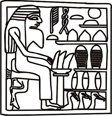 Grabstele der Heteti